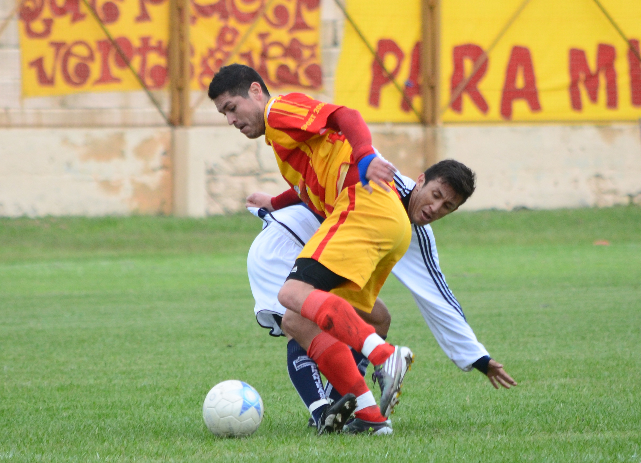 Paulo Centurión (Sarmiento de Resistencia) eludiendo a Gustavo Corti (San Martin de Formosa), en un compromiso valido por el Torneo Argentino B edicion 2012/3013